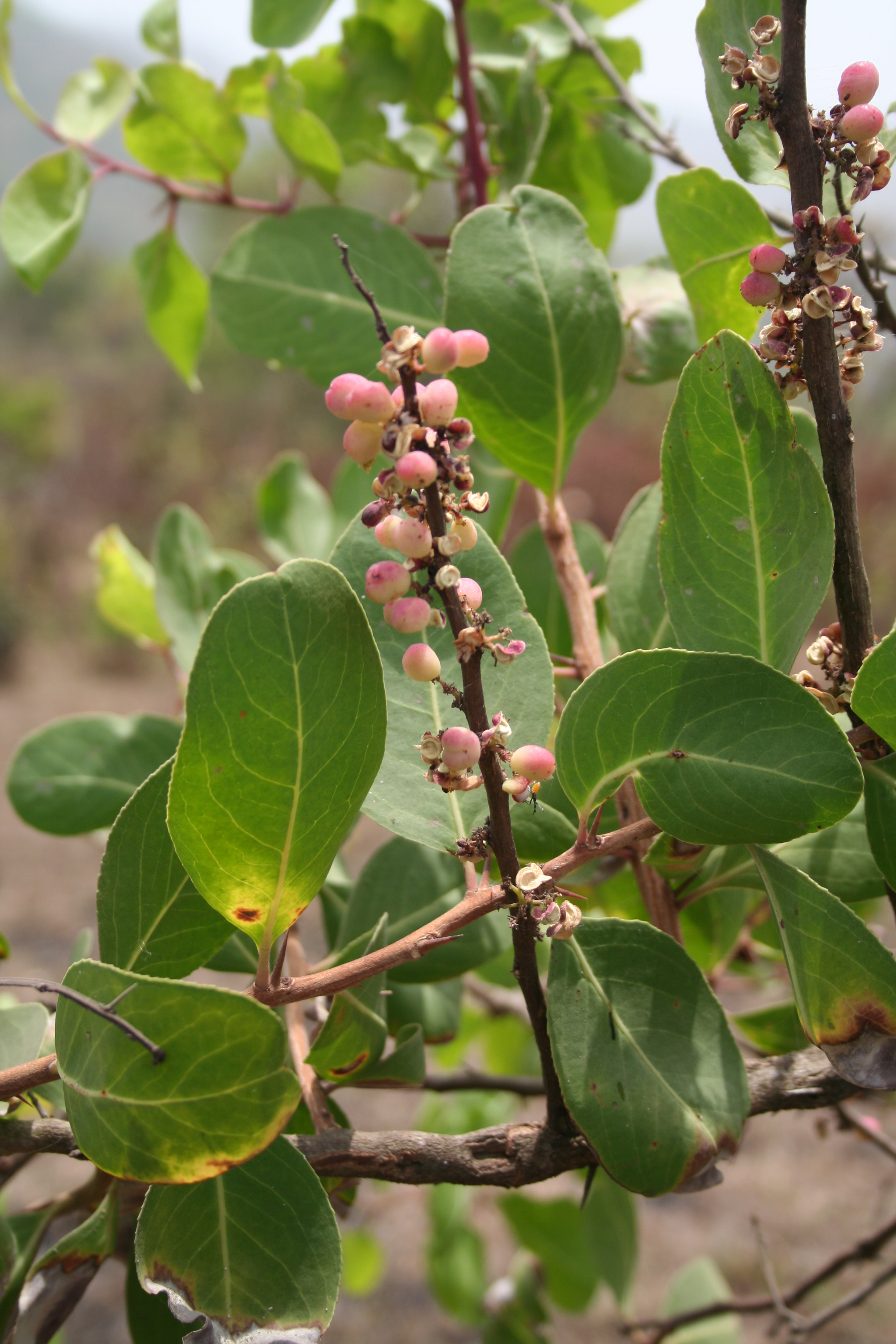 Gymnosporia senegalensis (syn. Maytenus senegalensis), Mt. Mbati, NW Cameroon